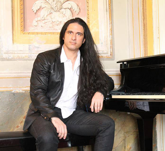 Concerto Milano 2014